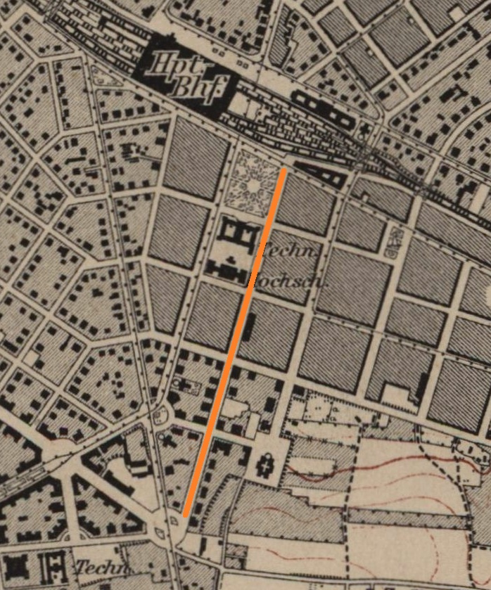 Sedanstraße (markiert) in Dresden, Ausschnitt aus: Topographische Karte (Messtischblätter) Sachsen, Ausschnitt Dresden, Abteilung für Landesaufnahme des Königl. Sächs. Generalstabes, 1:25000, 48 x 45 cm, Blatt 66, 1910.